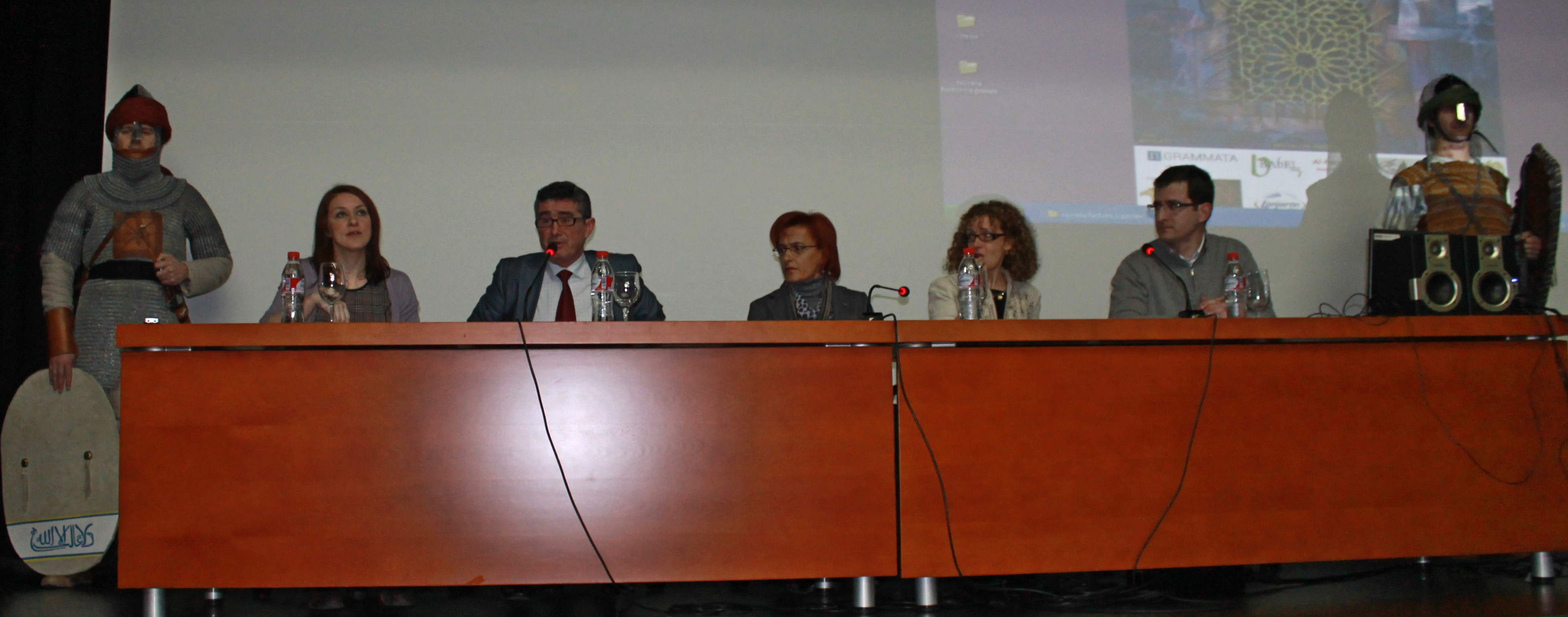 Jornadas